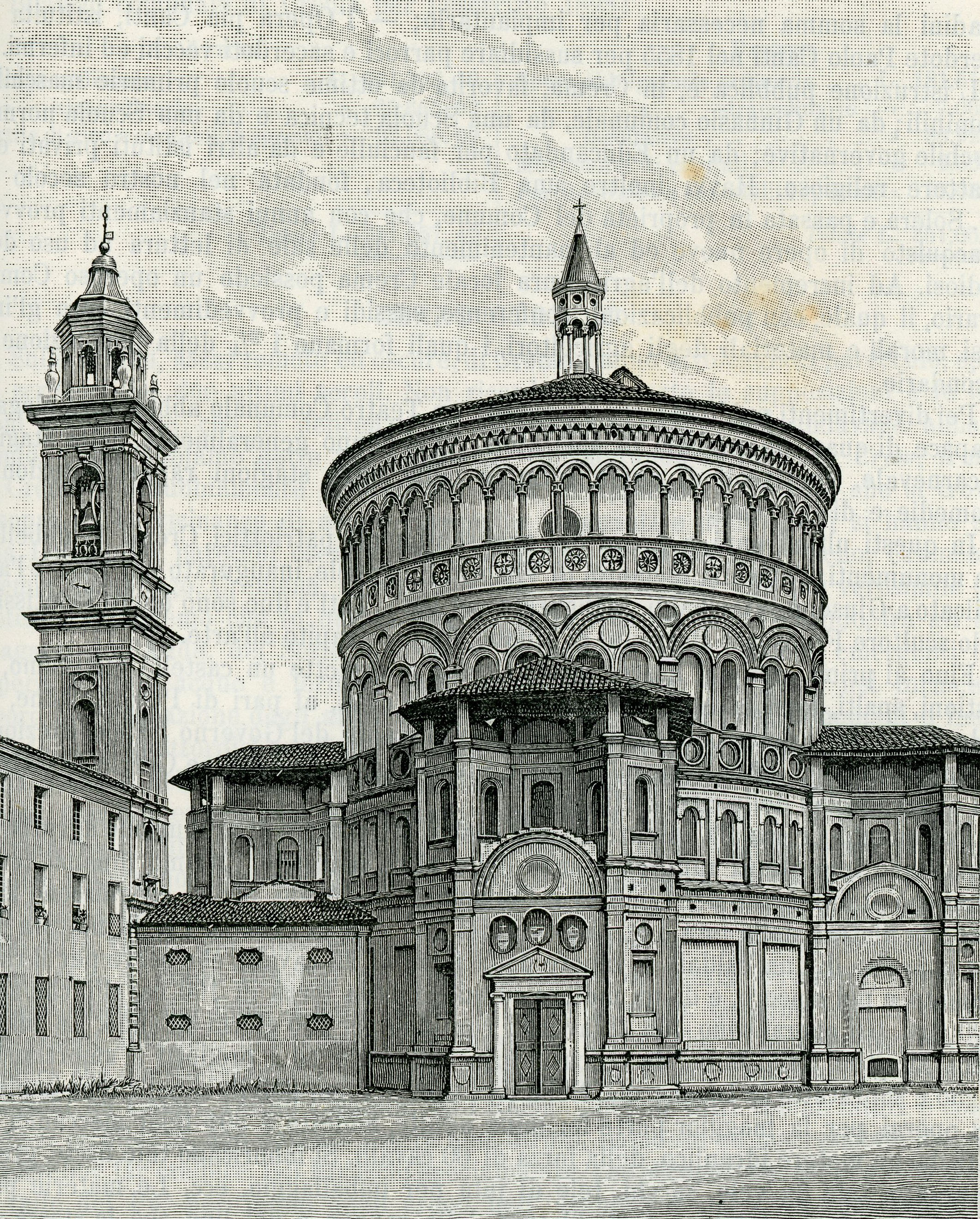 Crema (dintorni): chiesa di Santa Maria della Croce (xilografia di Giuseppe Barberis).